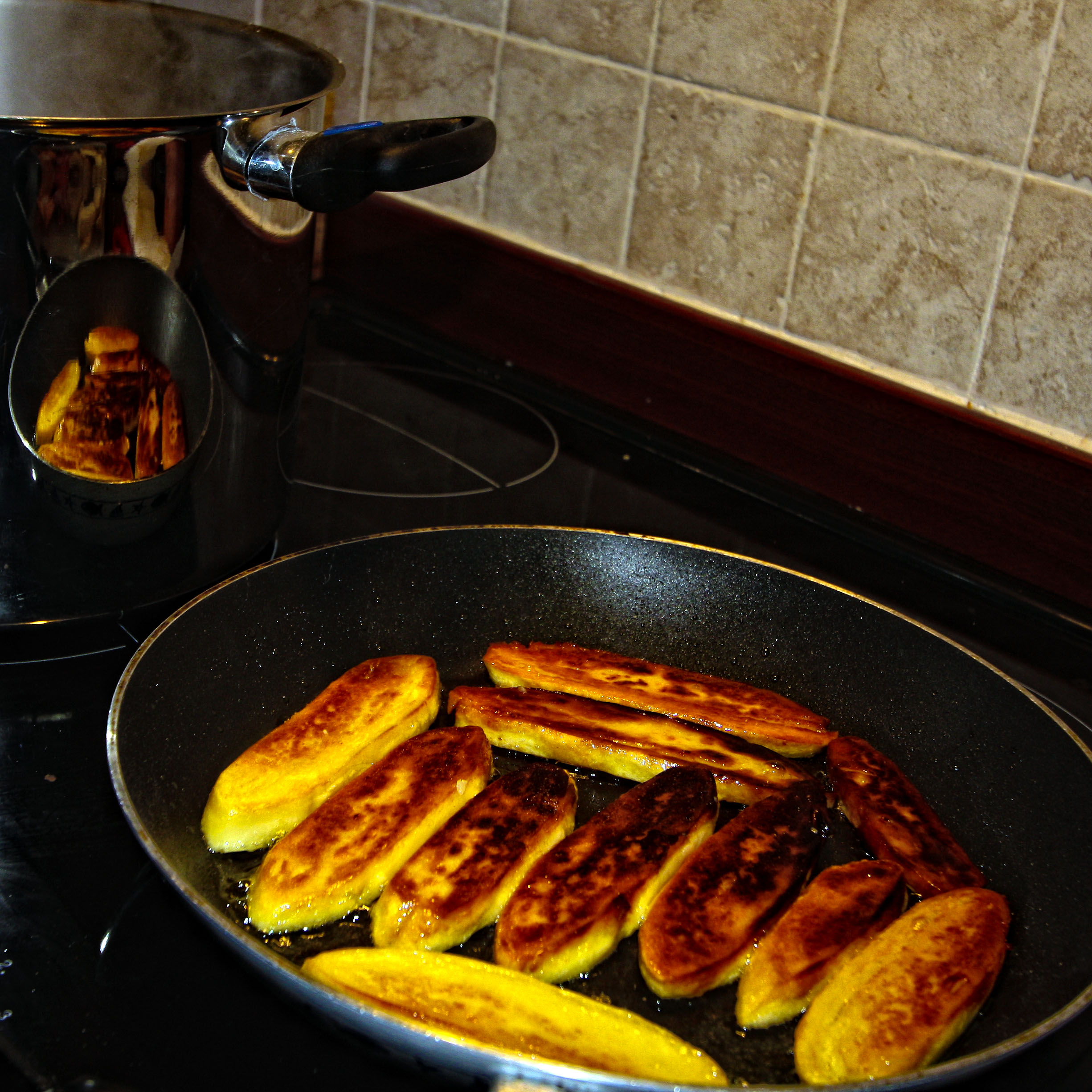 Panisses frits à l'huile d'olive